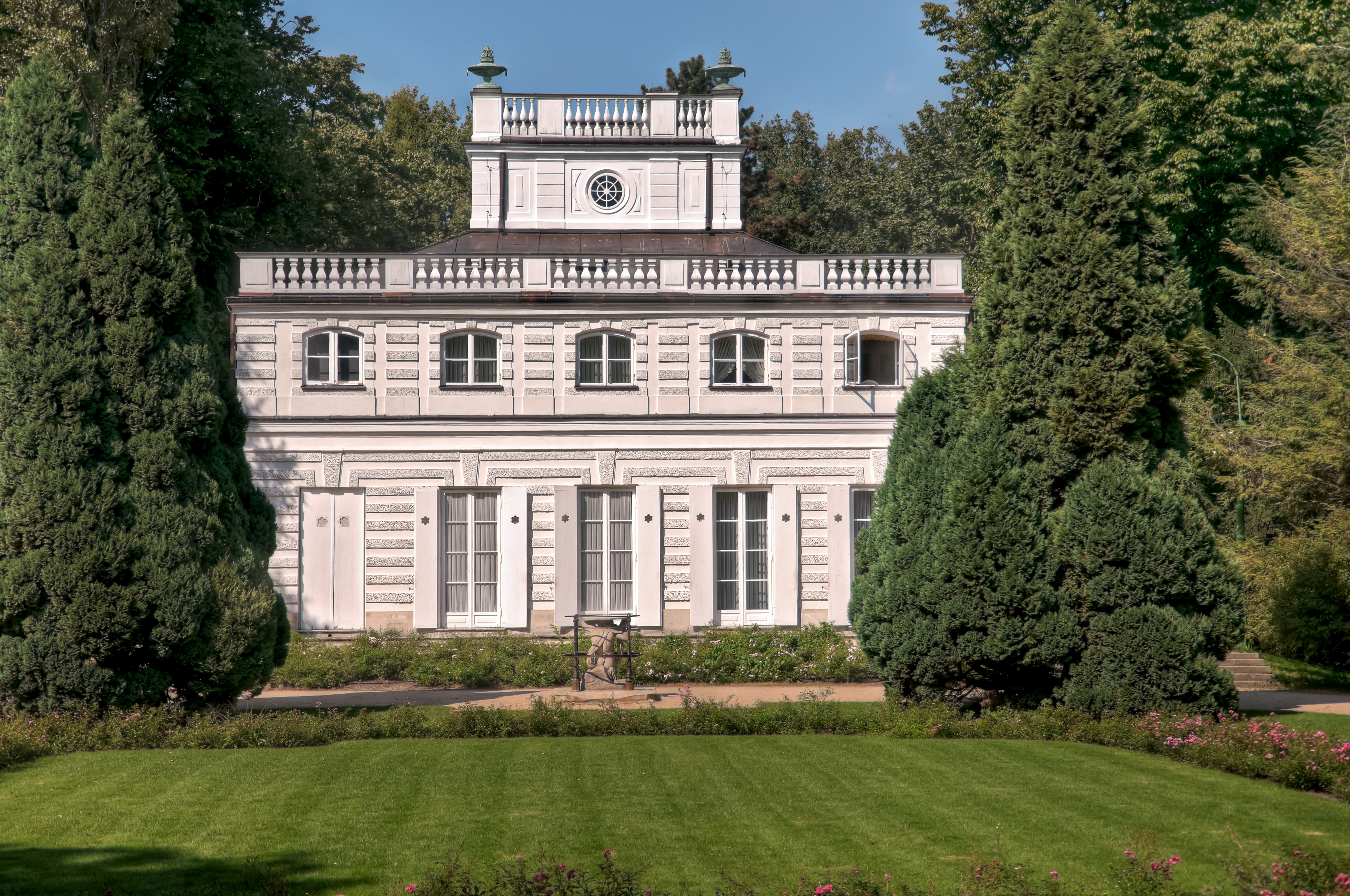 Biały Domek w zespole pałacowo-parkowym Łazienki